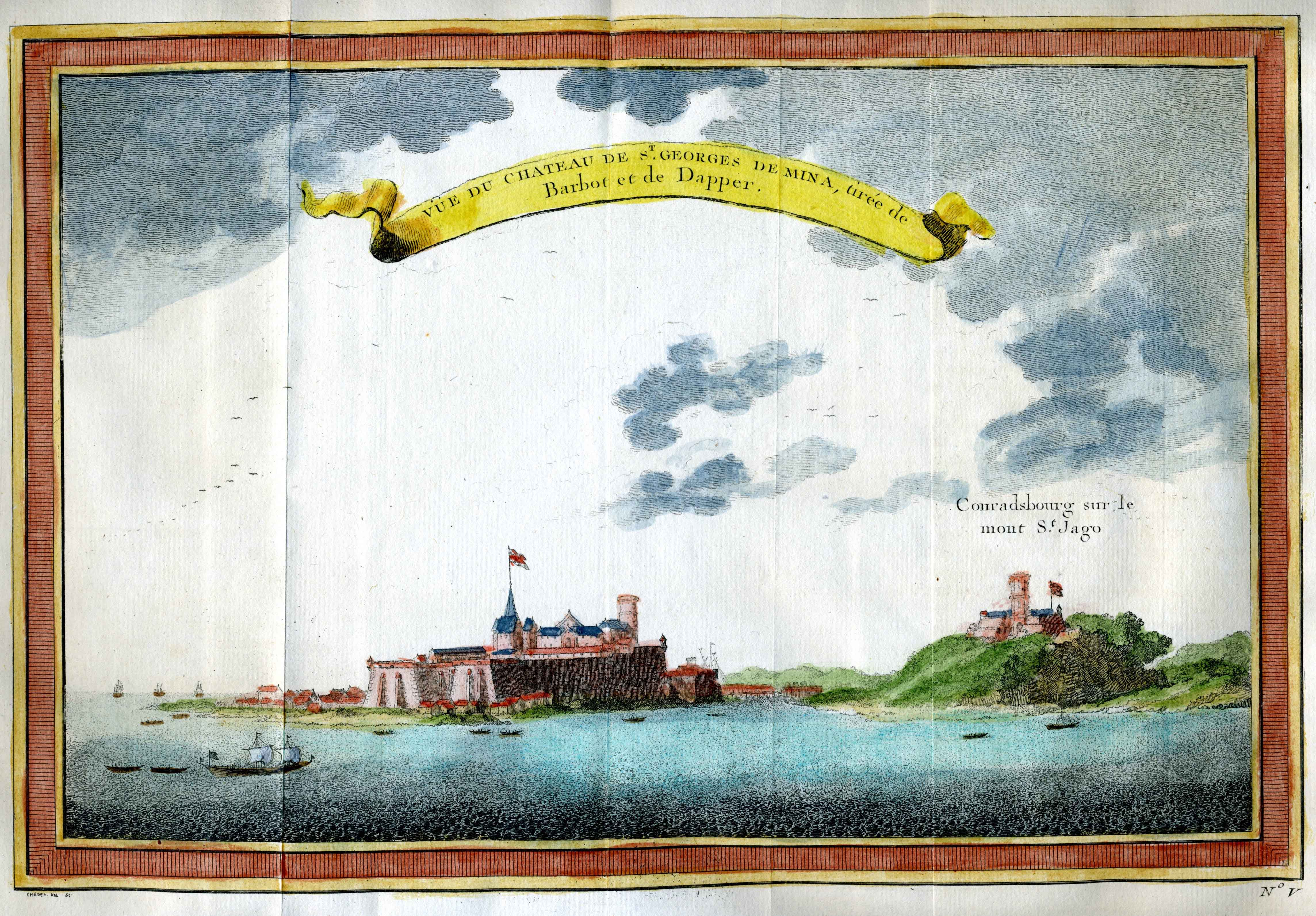 El Mina,Ghana,"Vüe du Chateau de St. Georges de Mina, tirée de Barbot et de Dapper" Histoire générale des voyages, Paris, Didot, 1750